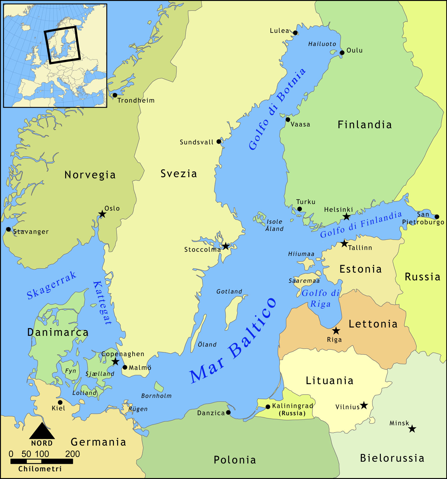 Map of Baltic sea and countries in Italian. Mappa del Mar Baltico e dei paesi circostanti